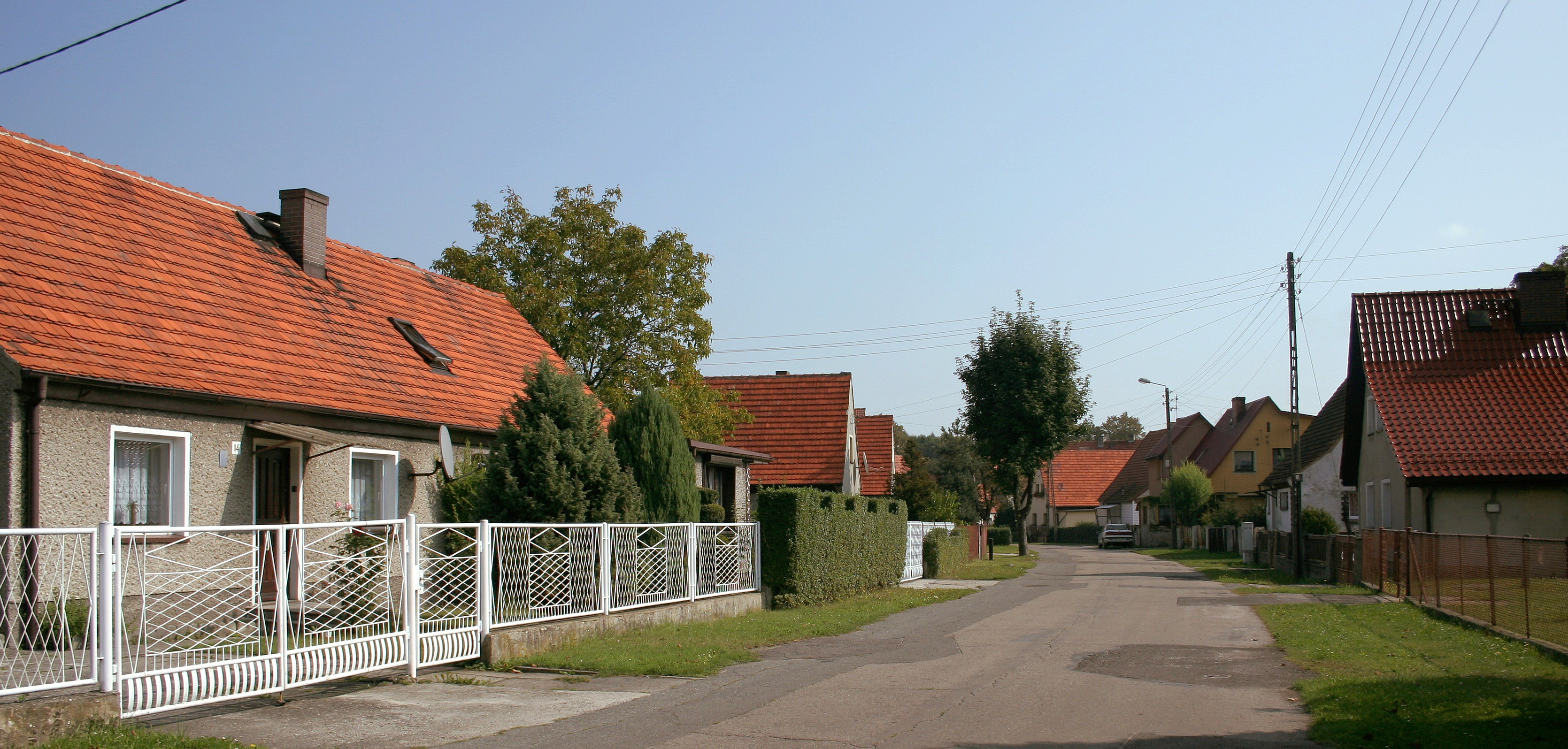 Fragment Wilczego Gardła, dzielnicy Gliwic, woj. śląskie